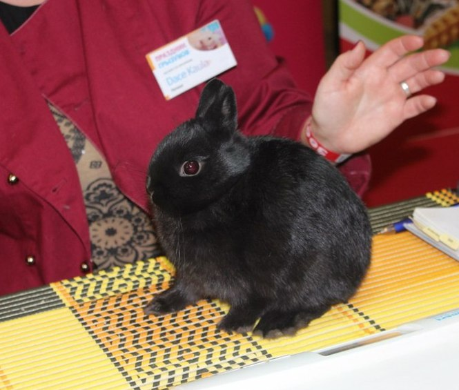 Экспертная оценка нидерландского карликового кролика на выставке